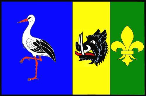 vlajka obce Hajany